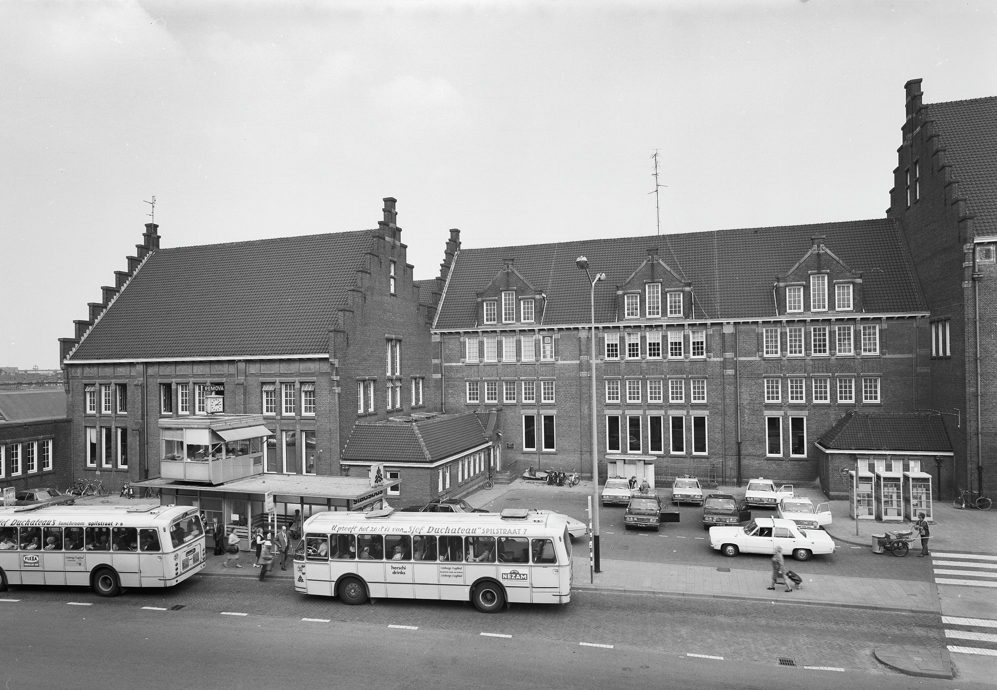 Station Nederlandse Spoorwegen: linker gedeelte voorgevel